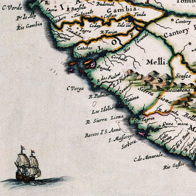 Kust van Sierra Leon met de Baixos de St. Anna. Detail uit de kaart Nigratarum Regio van Johannus Blaeu (1662)